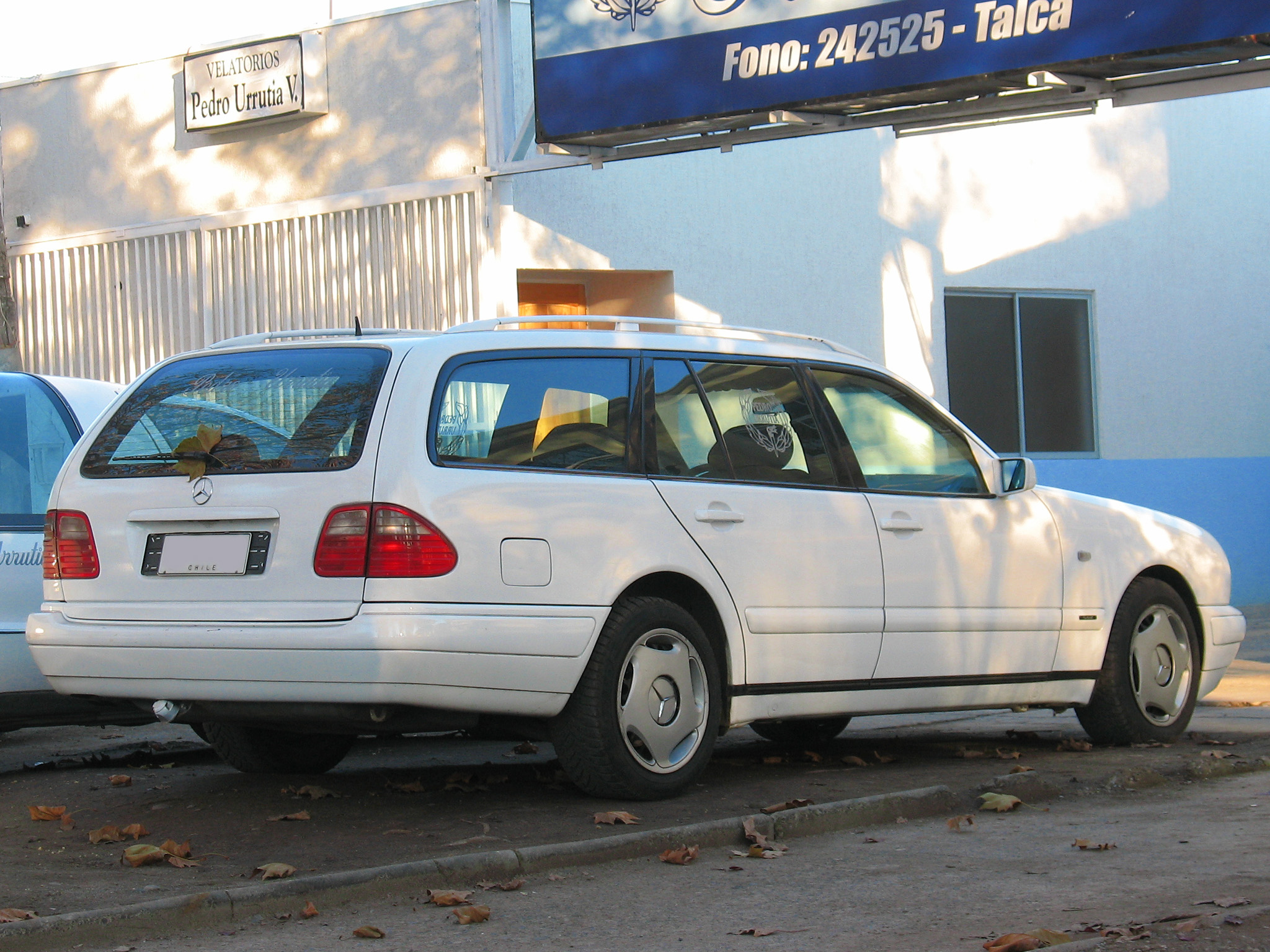 Mercedes Benz E 300 D Classic Estate 1999